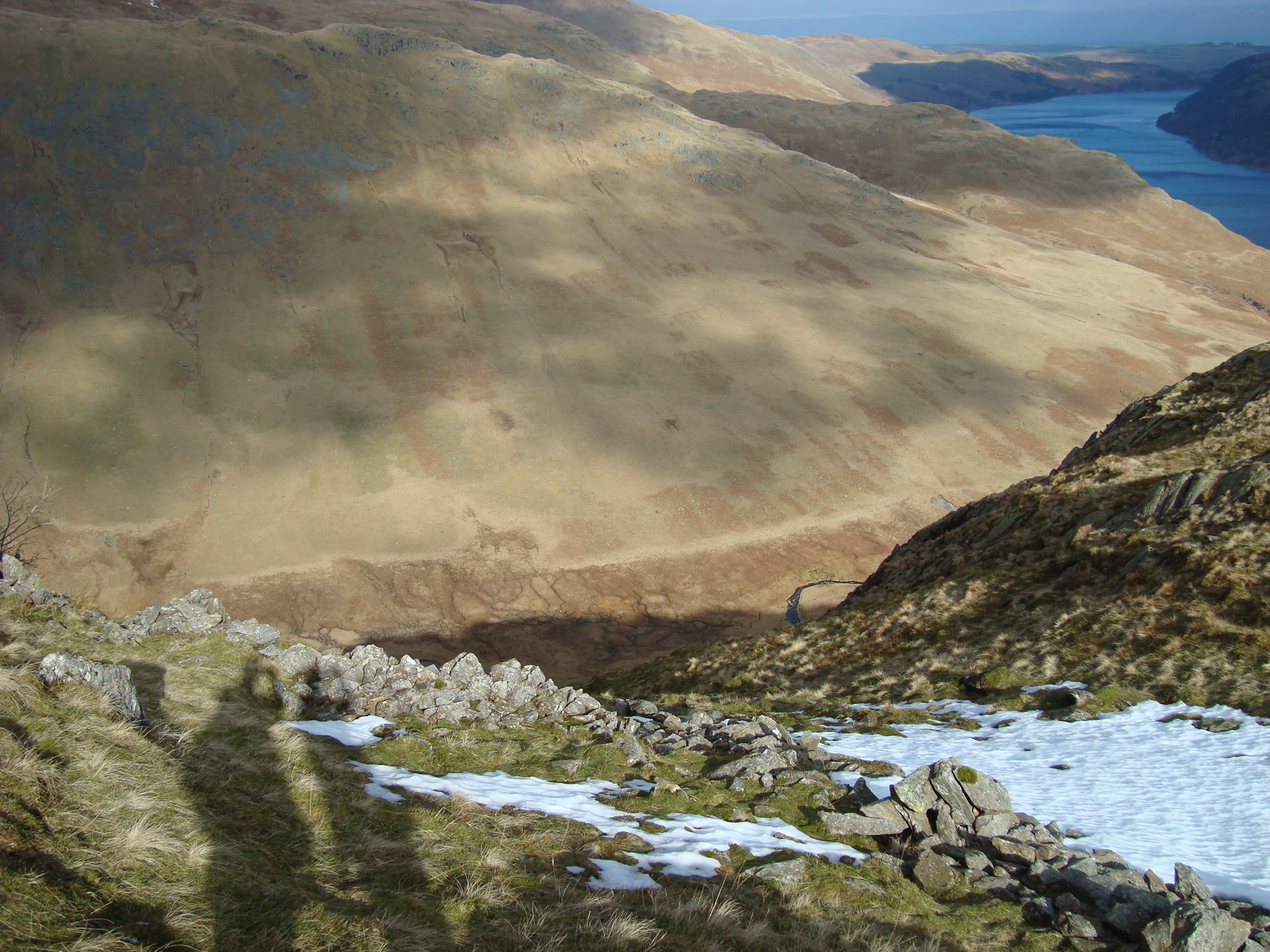 Mardale